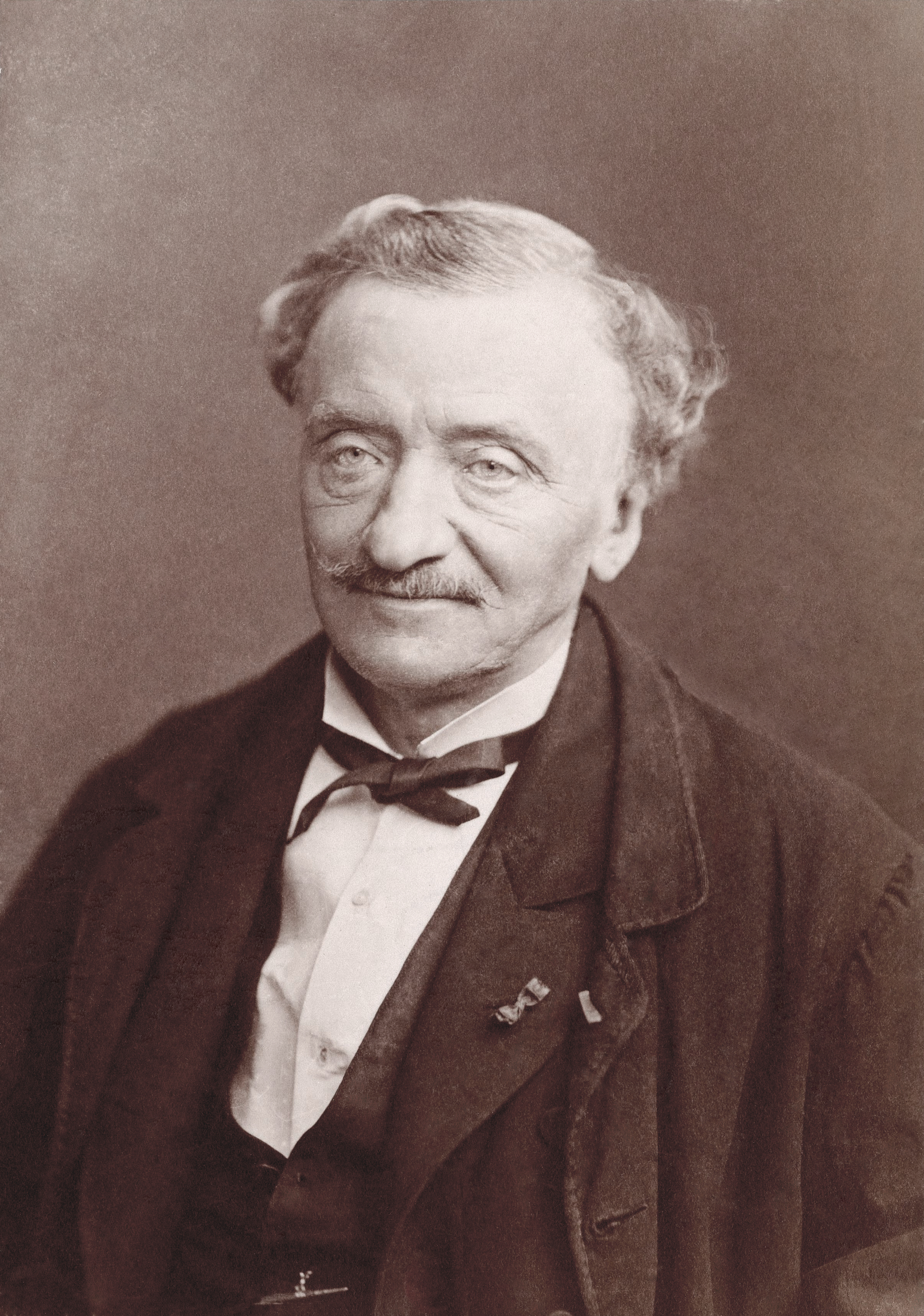 Antoine Elwart (1808 - 1877), compositeur, musicologue, professeur de musique et musicien français